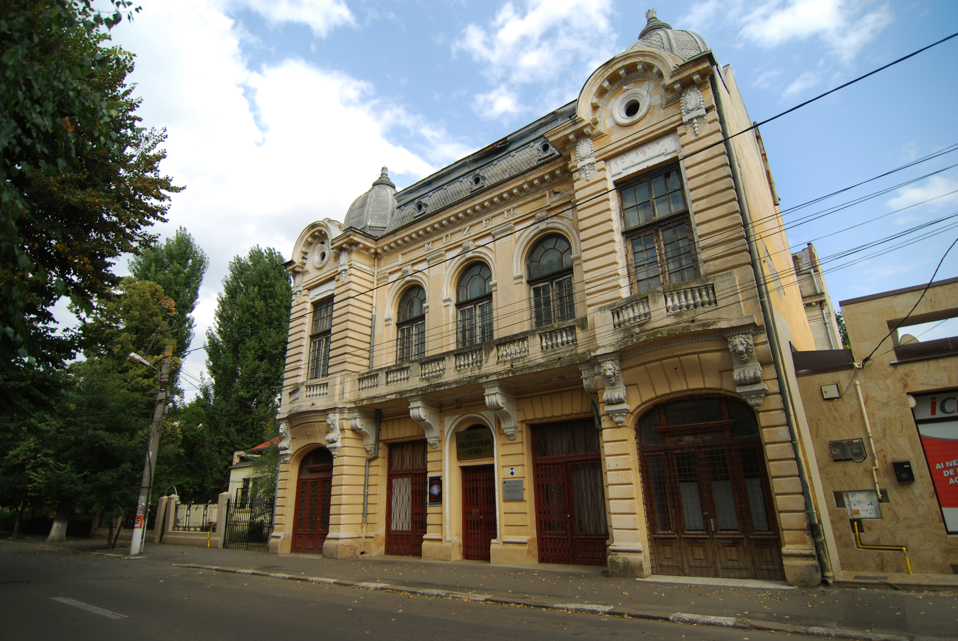 construcția datează din 1925